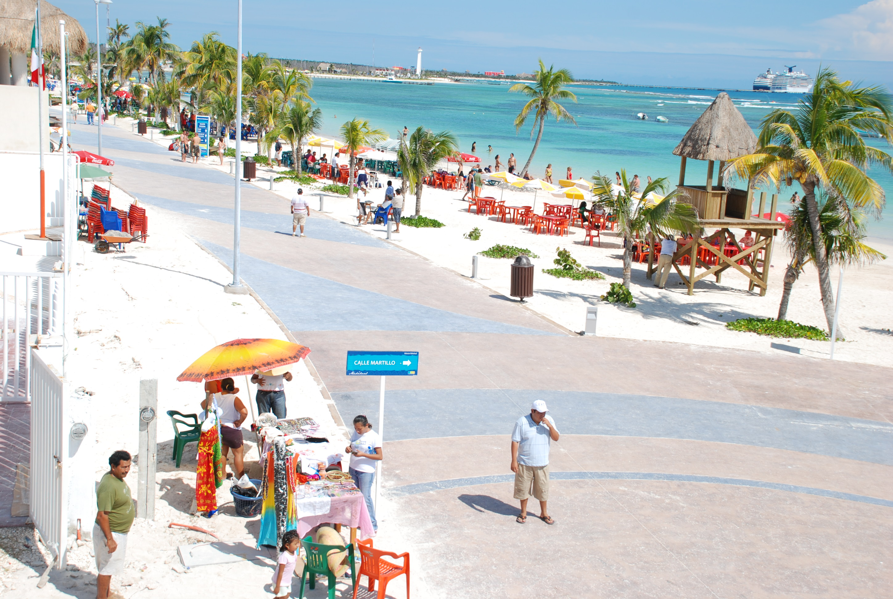 Othón P. Blanco, Quintana Roo, Mexico